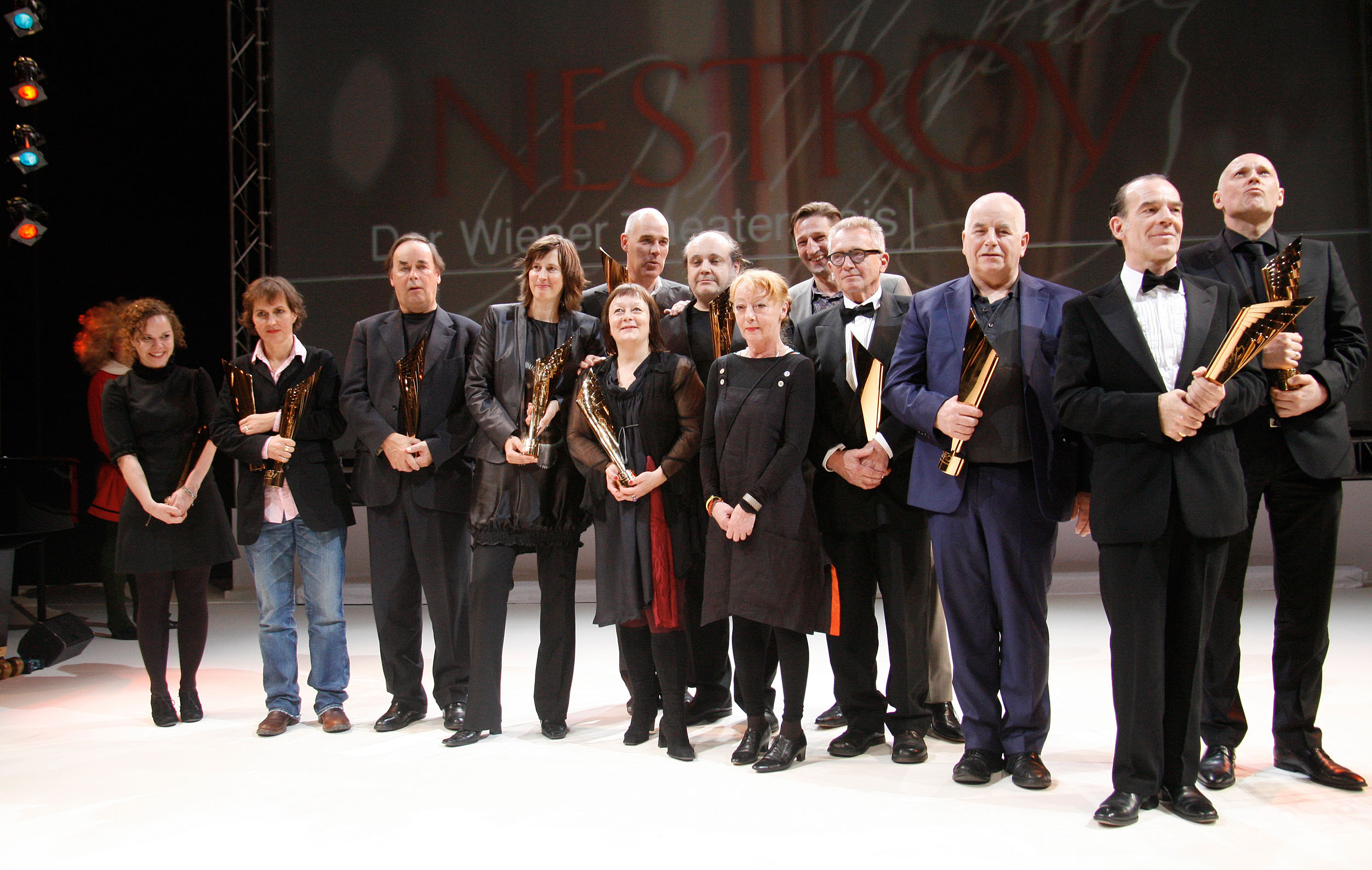 Sarah Viktoria Frick (Nachwuchs), Barbara Frey (Schauspielhaus Zürich, bestes Aufführung), Johann Adam Oest (Nebenrolle), Kathrin Röggla (Autorenpreis), Sabine Mitterecker (Theater.punkt, beste Off-Produktion), Matthias Hartmann (Spezialpreis), Paulus Manker (Publikumspreis), Ulrike Kaufmann (Lebenswerk), Andreas Patton (Theater.punkt, beste Off-Produktion), Erwin Piplits (Lebenswerk), Johannes Schütz (Ausstattung), Martin Wuttke (Schauspieler) und Alvis Hermanis (Regie) bei der Verleihung des Nestroy-Theaterpreises 2010 im Burgtheater in Wien.